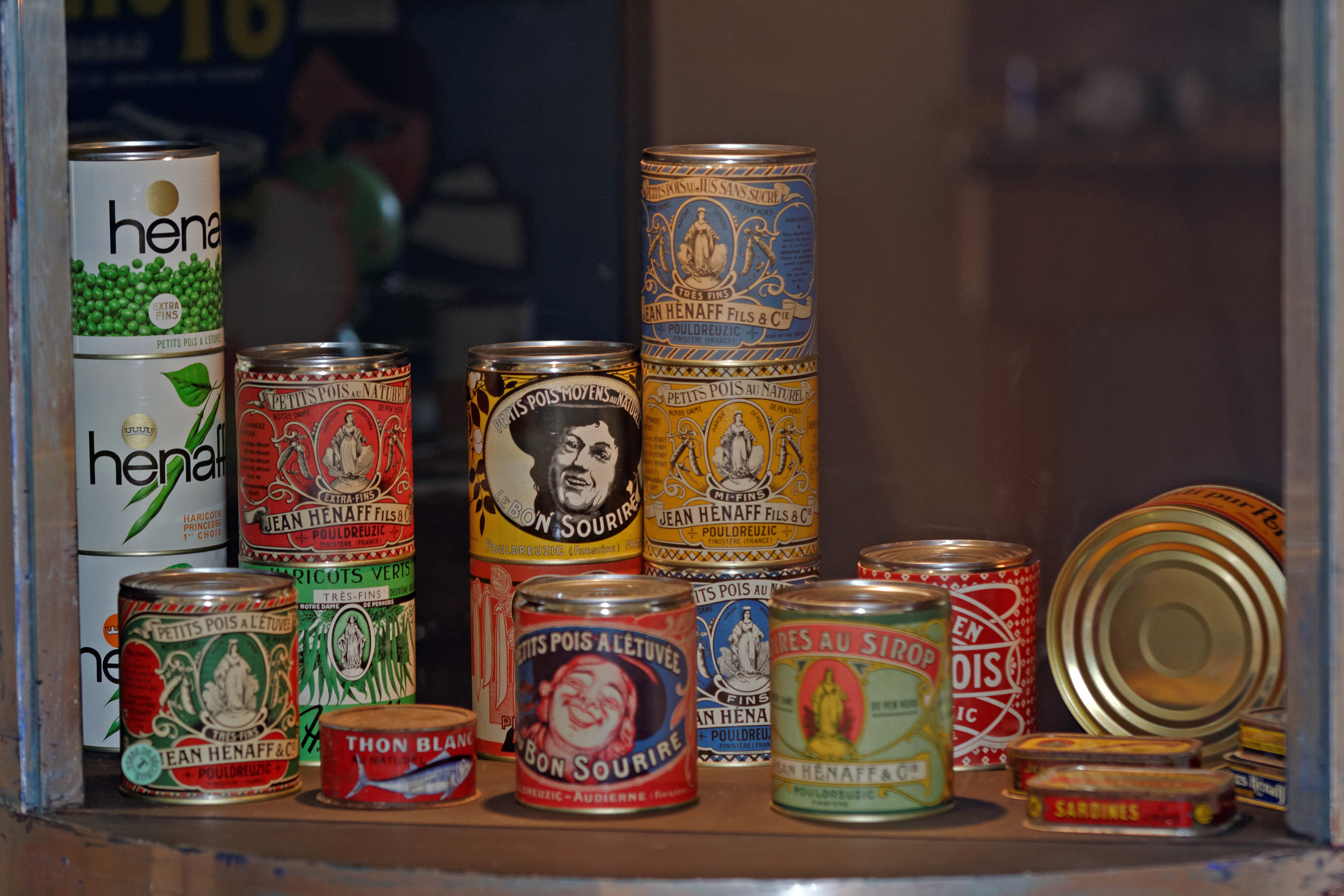 Exposition sur l'histoire du Pâté Hénaff dans le musée de la marque à Pouldreuzic.